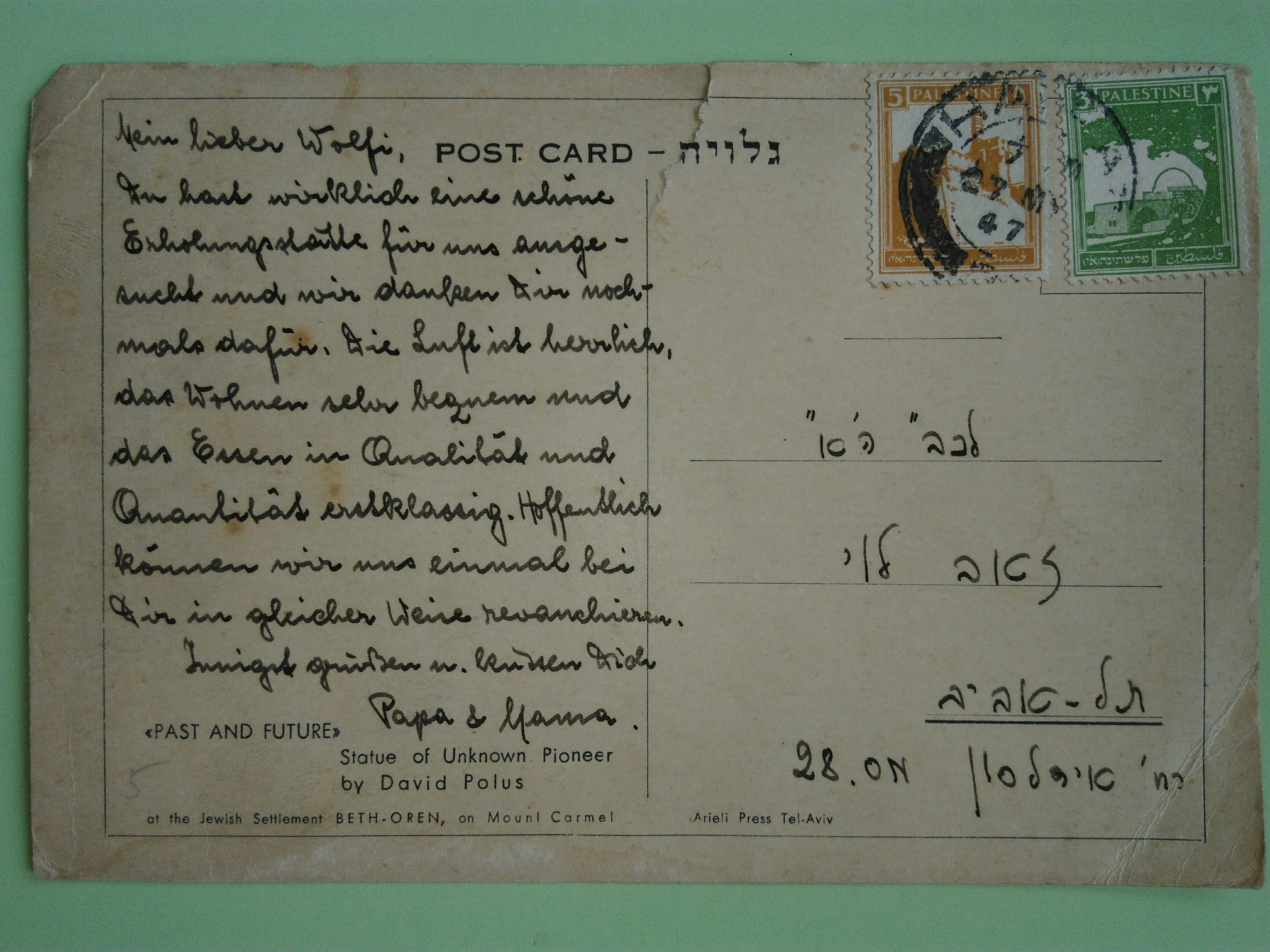 Eine private Mitteilung auf einer Postkarte nach Tel Aviv vom 27. Mai 1947.